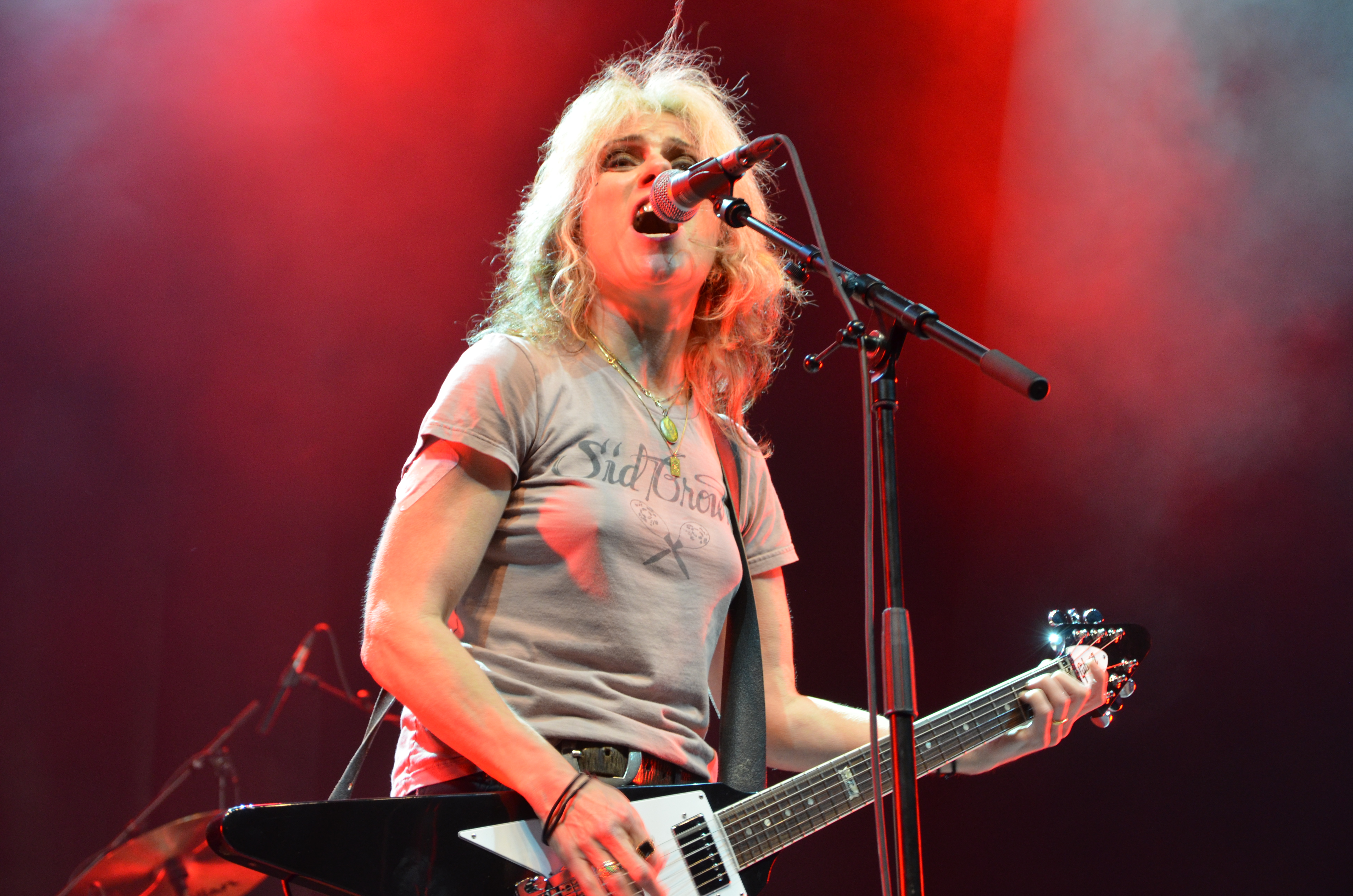 L7 spielen bei Rock am Ring 2015 in Mendig.